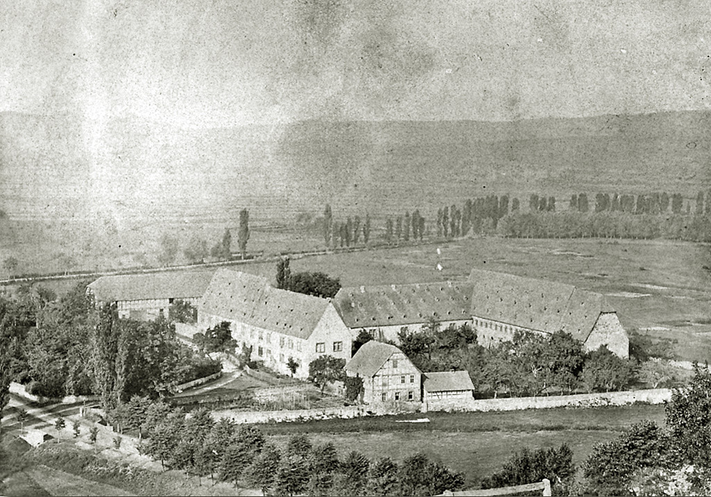 Das ehemalige Zisterzienserinnenkloster St. Georgenberg bei Frankenberg, um 1870.